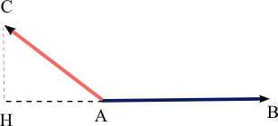 Produit scalaire des vecteurs AB et AC (version 2). Author HB.